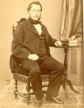 Philip Johannes Bachiene